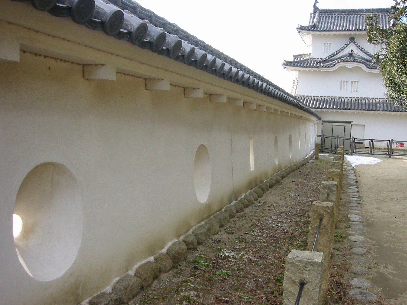 明石城 帯郭、坤櫓